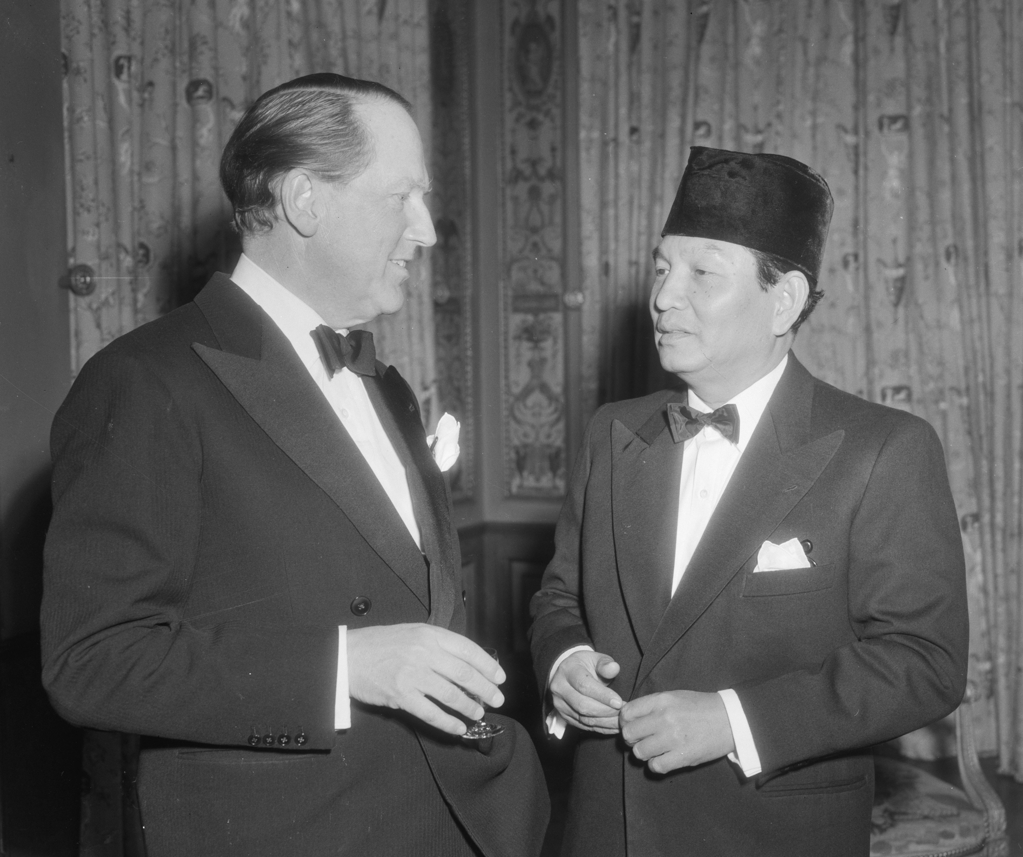 Collectie / Archief : Fotocollectie Anefo Reportage / Serie : [ onbekend ] Beschrijving : Minister Beyen in gesprek met mr. Sartono Datum : 14 juni 1954 Fotograaf : Duinen, […] van / Anefo Auteursrechthebbende : Nationaal Archief Materiaalsoort : Negatief (zwart/wit) Nummer archiefinventaris : bekijk toegang 2.24.01.04 Bestanddeelnummer : 906-5240